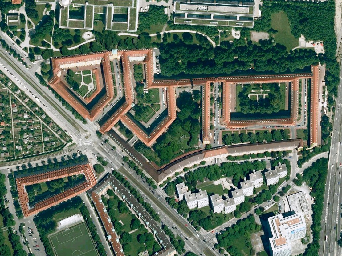 Luftaufnahme der Bayerischen Vermessungsverwaltung: Siedlung Borstei in München, Bayern.